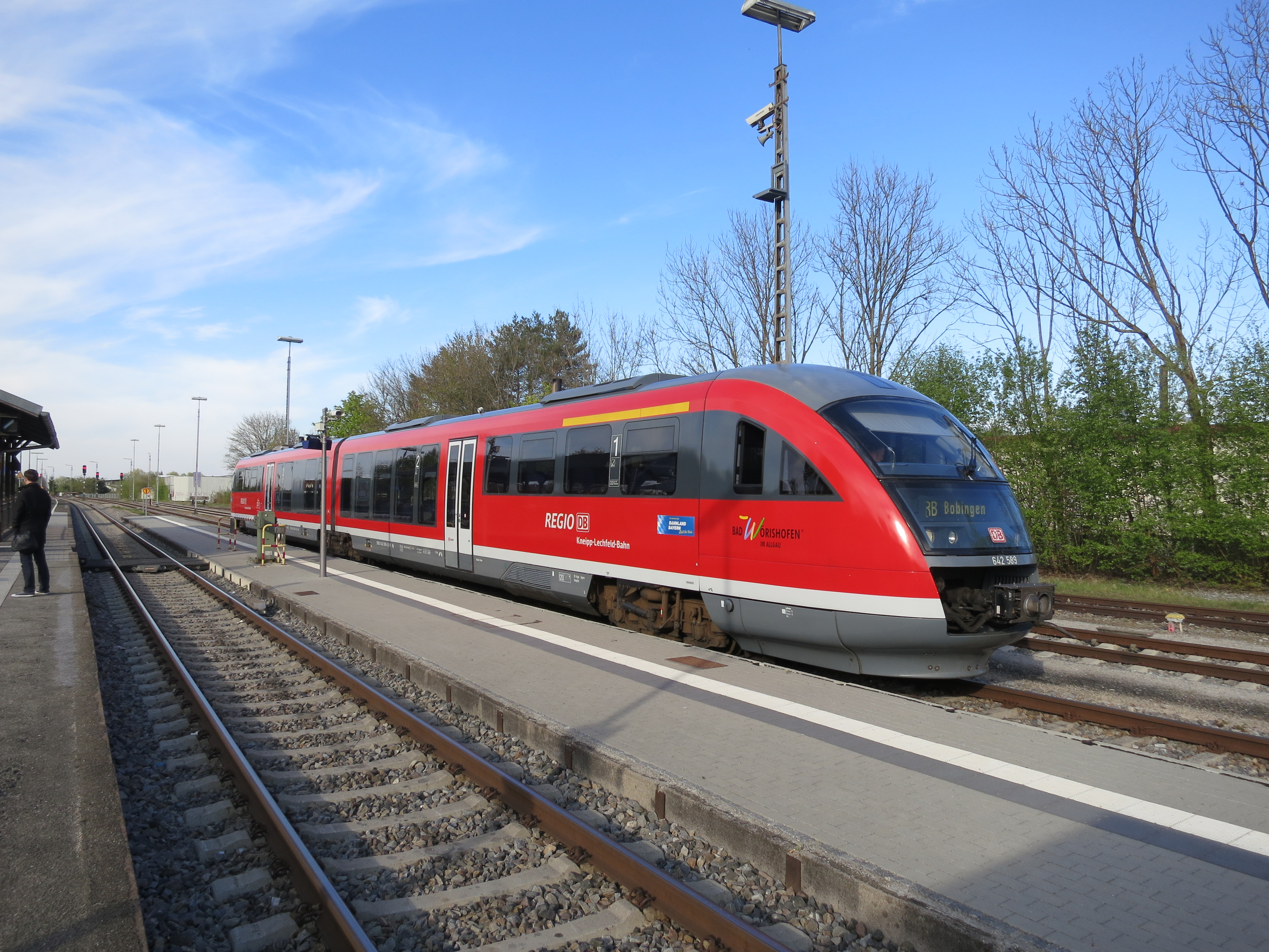 Dieseltriebwagen der Baureihe 642, Desiro, als Regionalbahn nach Augsburg im Bahnhof Bobingen